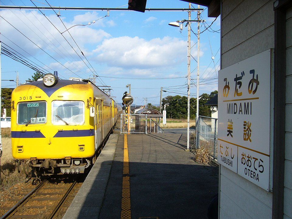 一畑電車 美談駅を発車する3000系